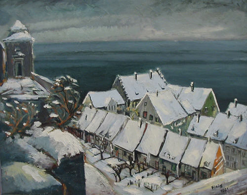 Meersburg im Winter